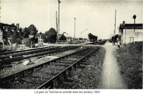 archive personnelle agée de plus de 50 ans non commercialisée ni numérisée